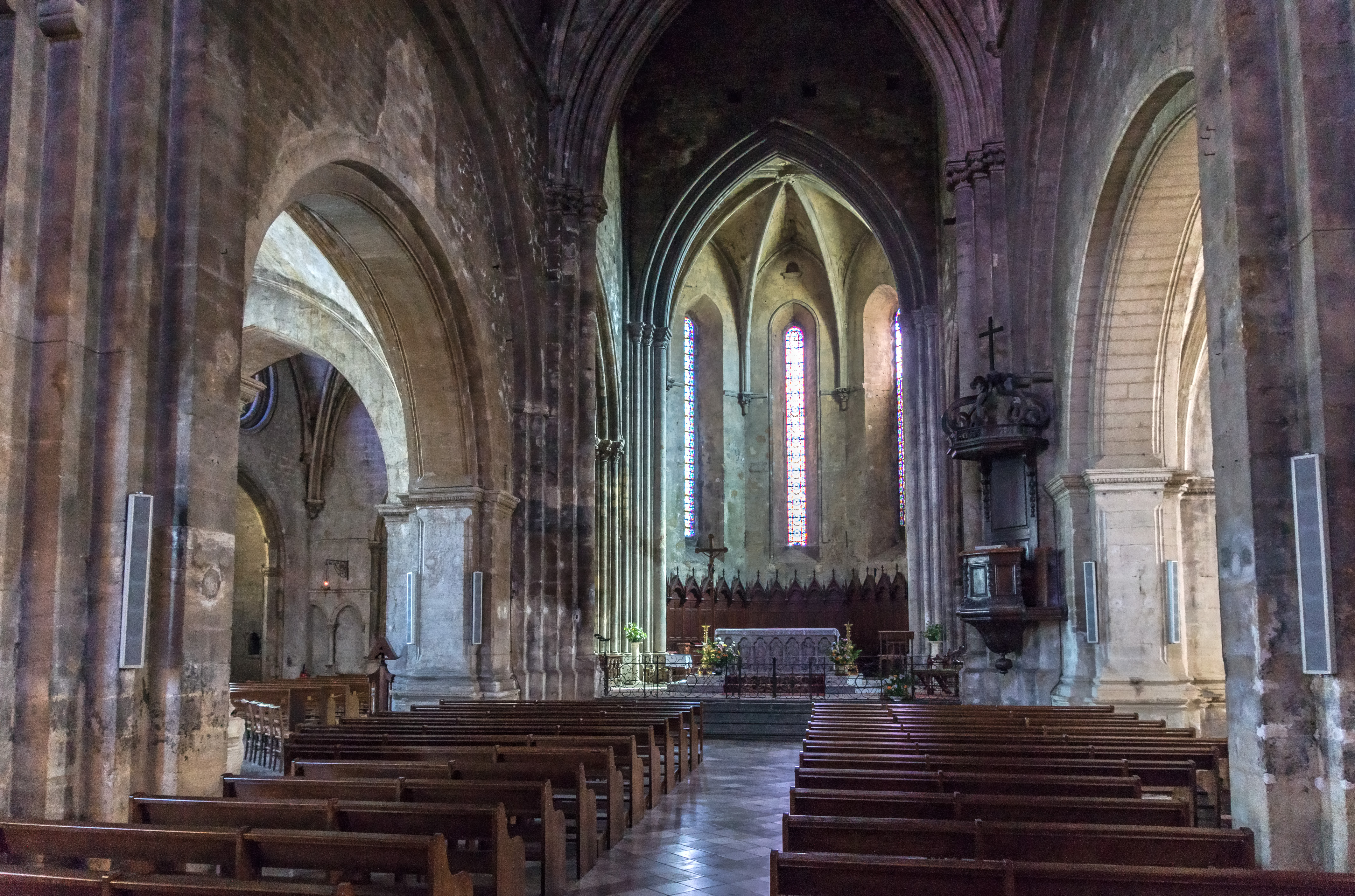 Forcalquier - Cathédrale Notre-Dame du Bourguet - Intérieur